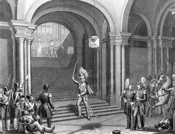 Asalto al Palacio Real de Madrid por el teniente general Diego de León en 1841, durante la Regencia de Baldomero Espartero.